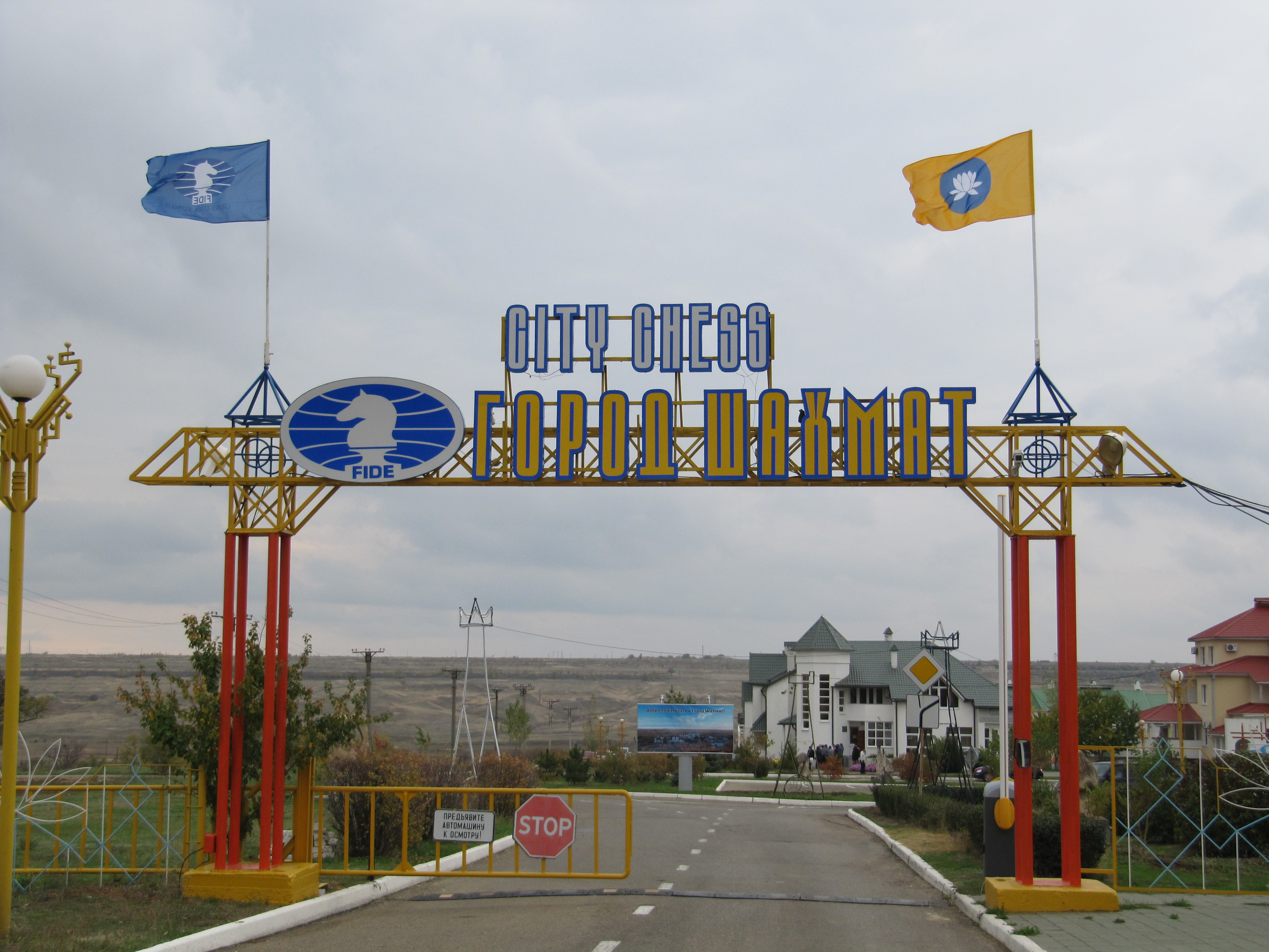 Сити Чесс, Элиста, Калмыкия